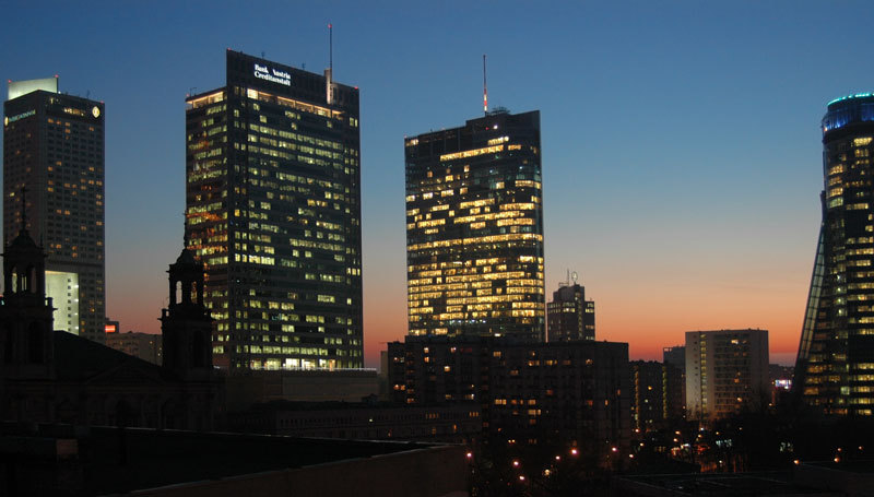 Centrum Warszawy